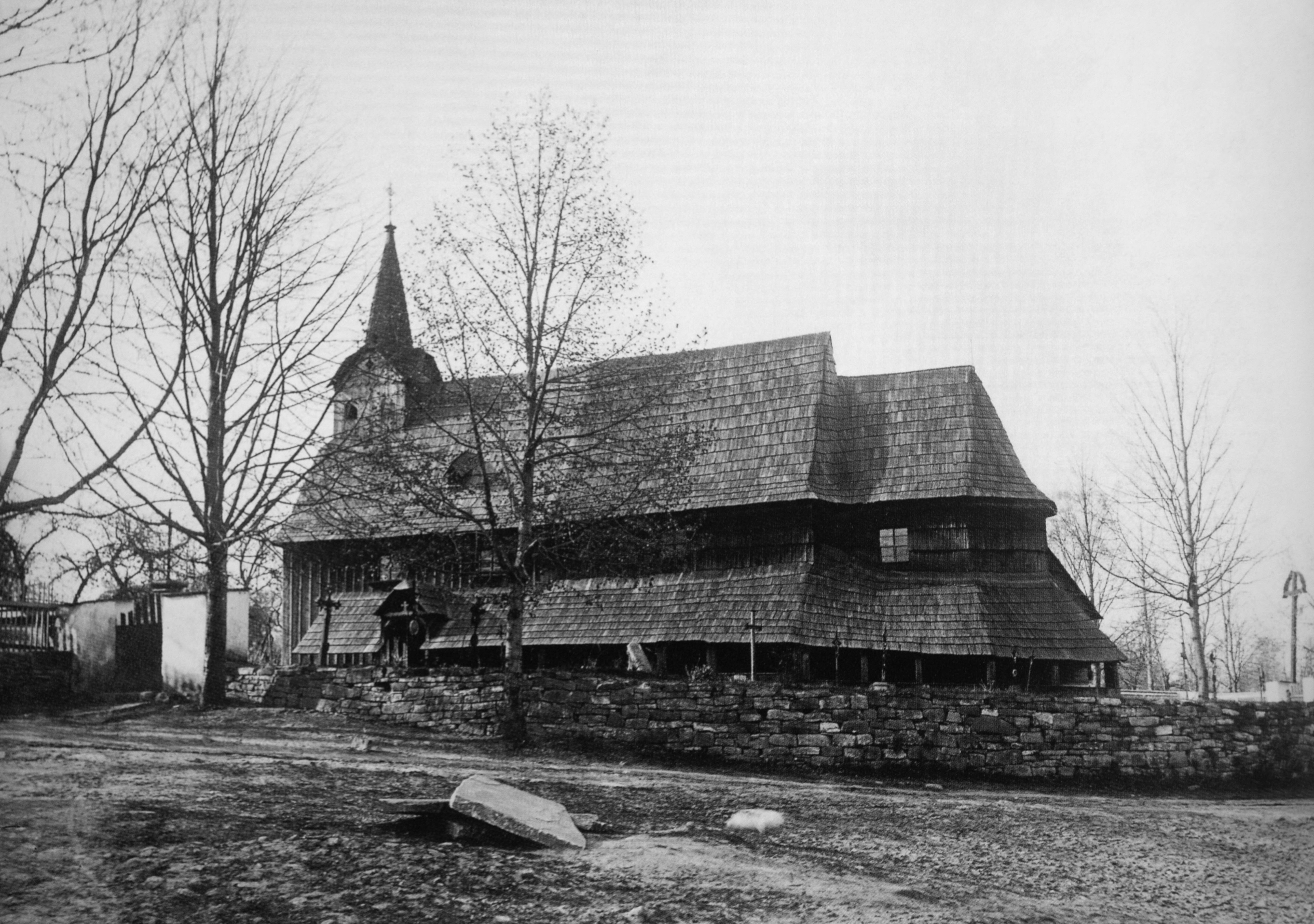 Bývalý dřevěný kostel v Kopřivnici, ca. 1895